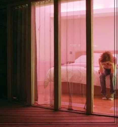 me acuerda a esa pelicula q se llama Hermosa Locura.... cuando uno tiene pena.. lo unico q quiere es estar solo(a), sin ganas de salir ni de hablar y menos de comer o tomar algo.... solo soledad.